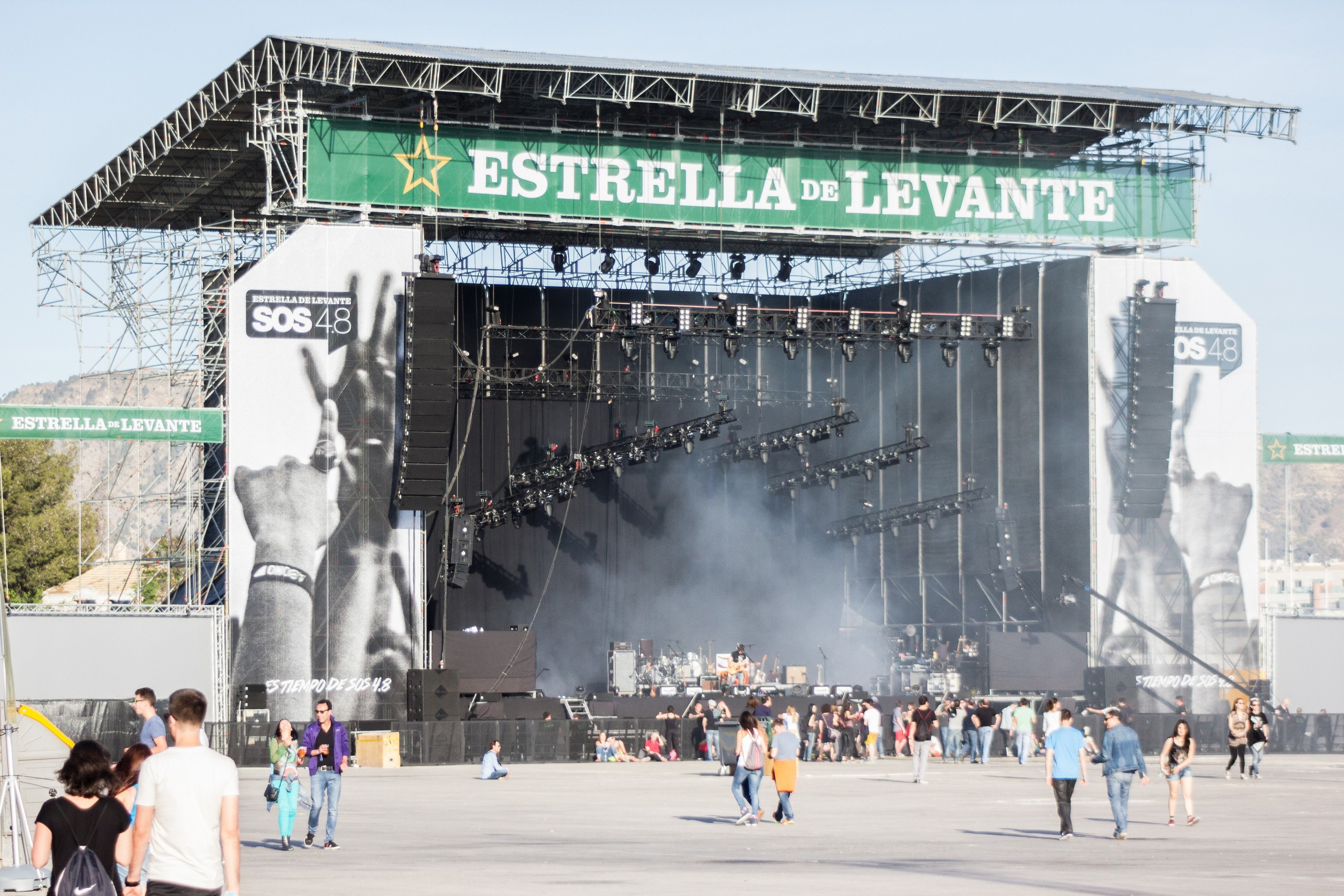 El Festival Estrella Levante SOS 4.8 es un festival internacional de acción artística sostenible que tiene lugar en la ciudad de Murcia, España. Fotografía del escenario principal Estrella de Levante.